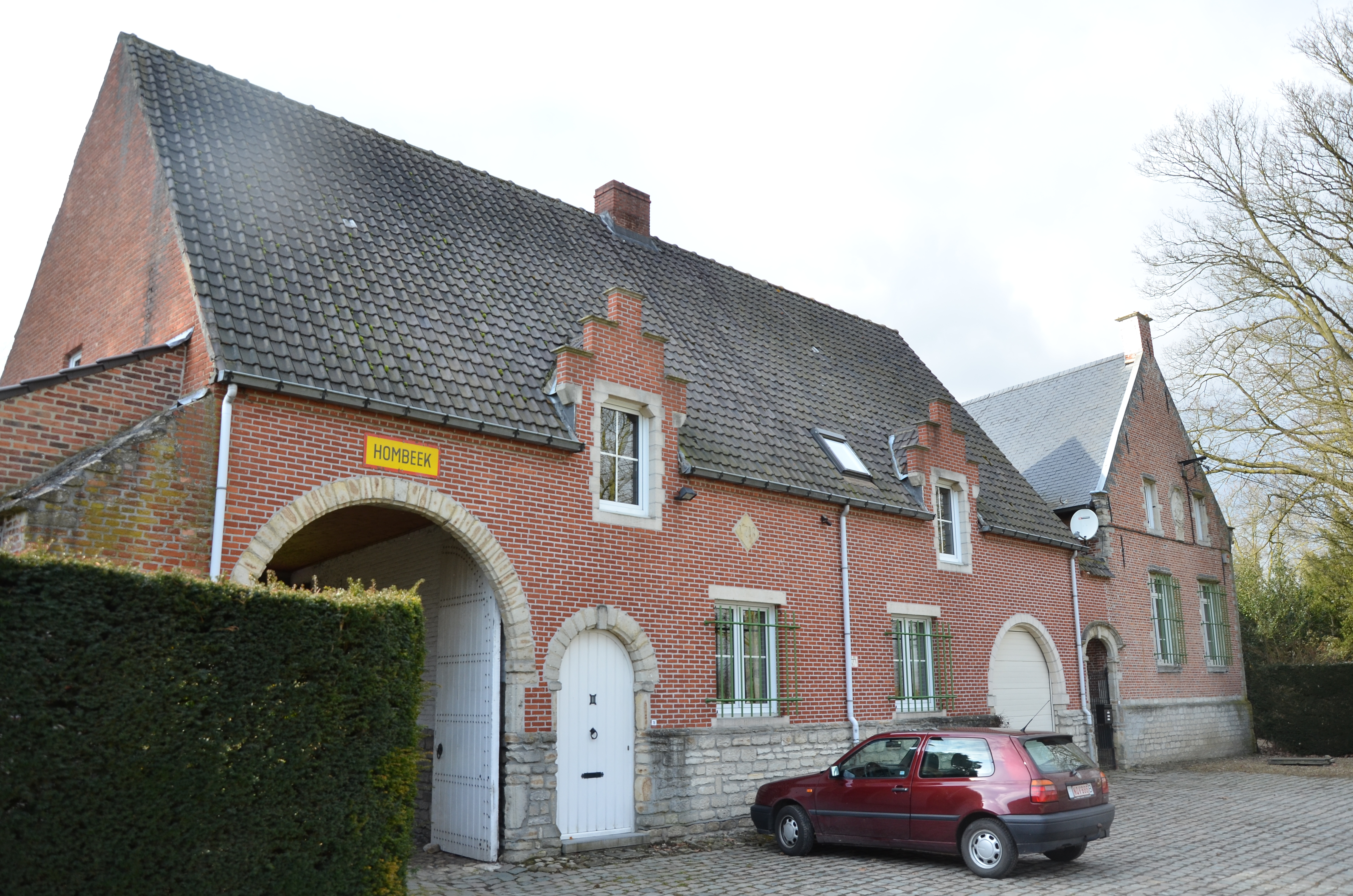 Hof ter Heyde